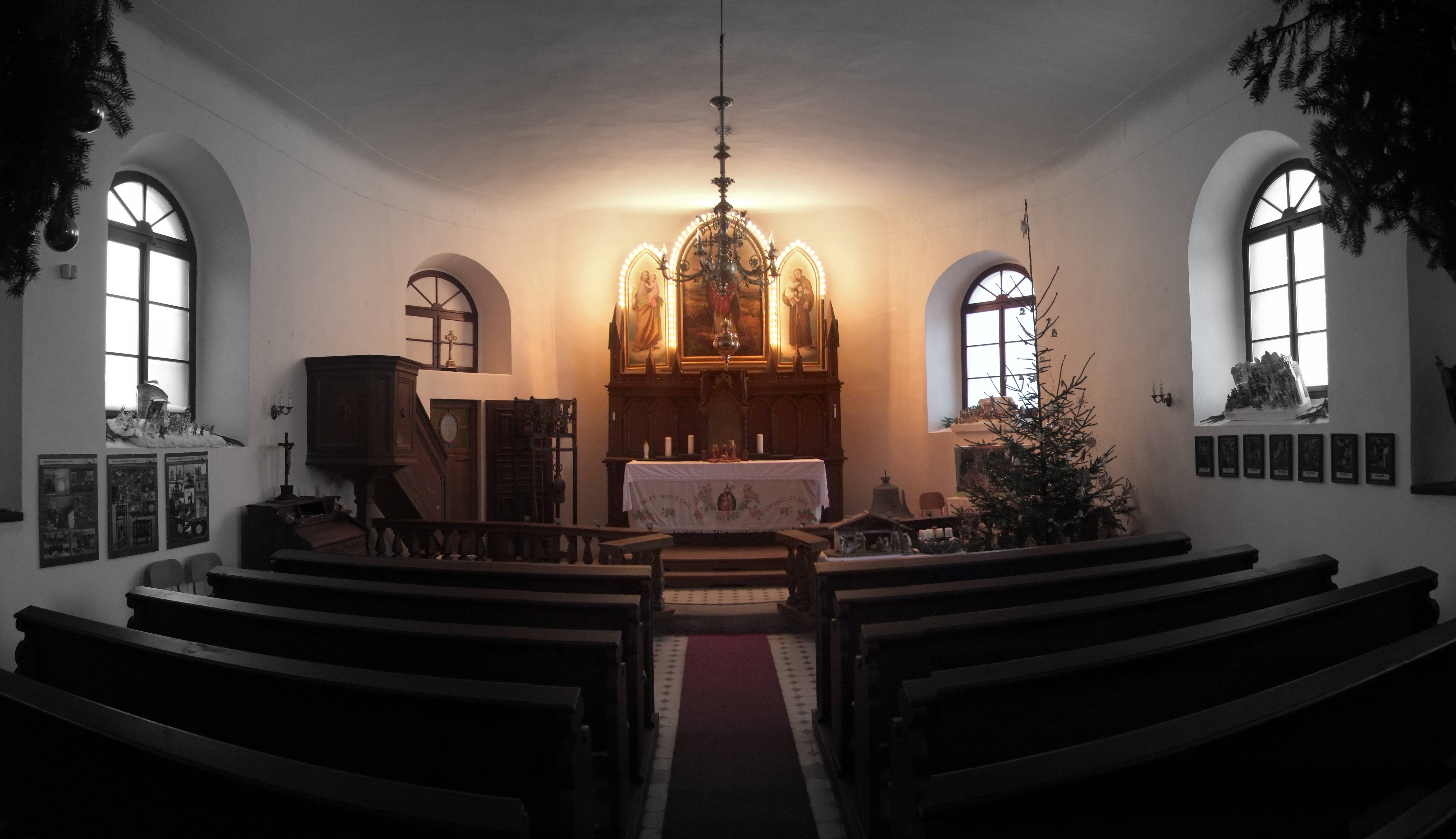 interiér kostela svatého Vojtěcha v Ostašově v roce 2017 po mnoha opravách a rekonstrukcích, které zajišťuje Spolek přátel Ostašova